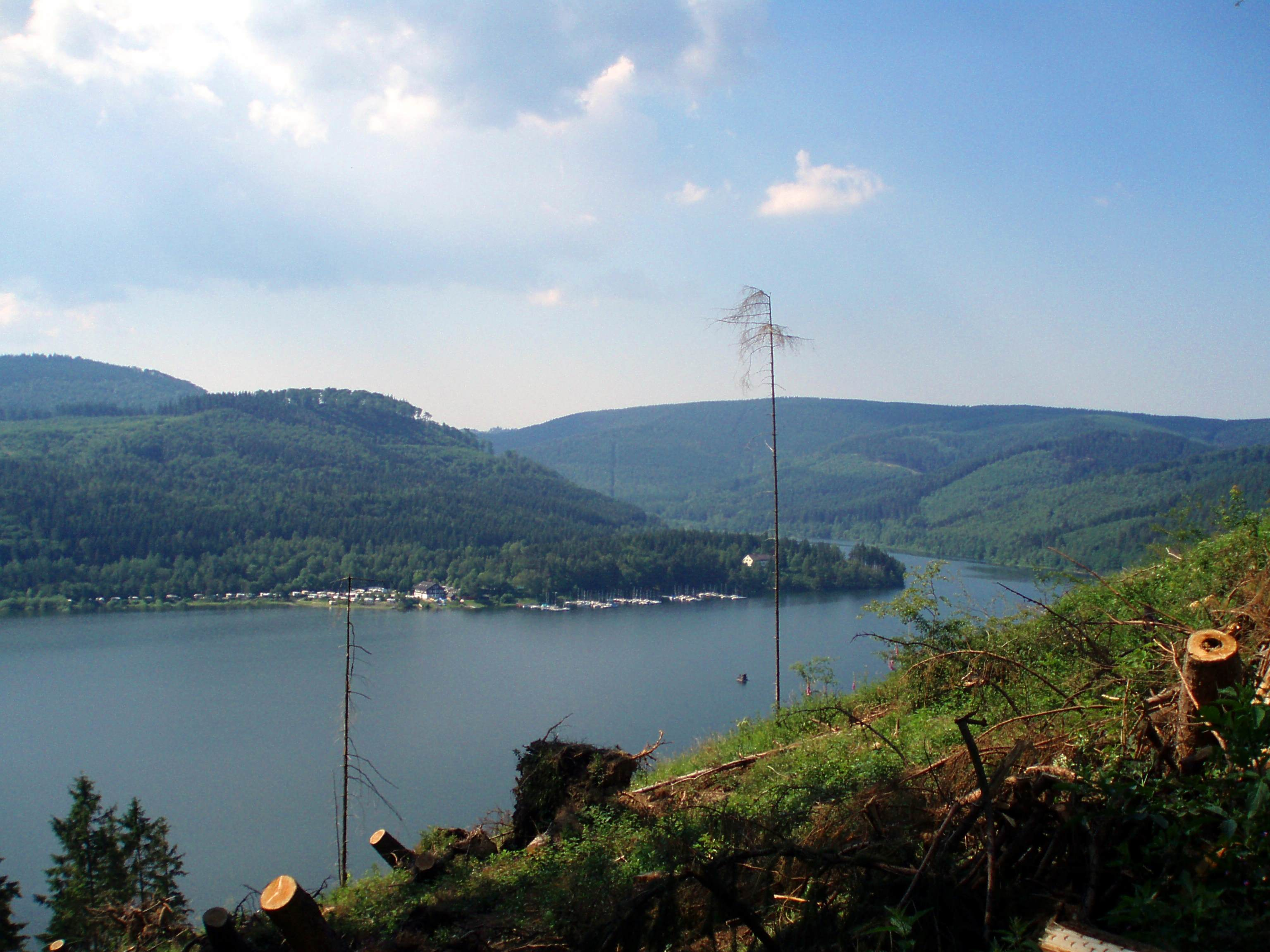 Blick auf die Innerstetalsperre